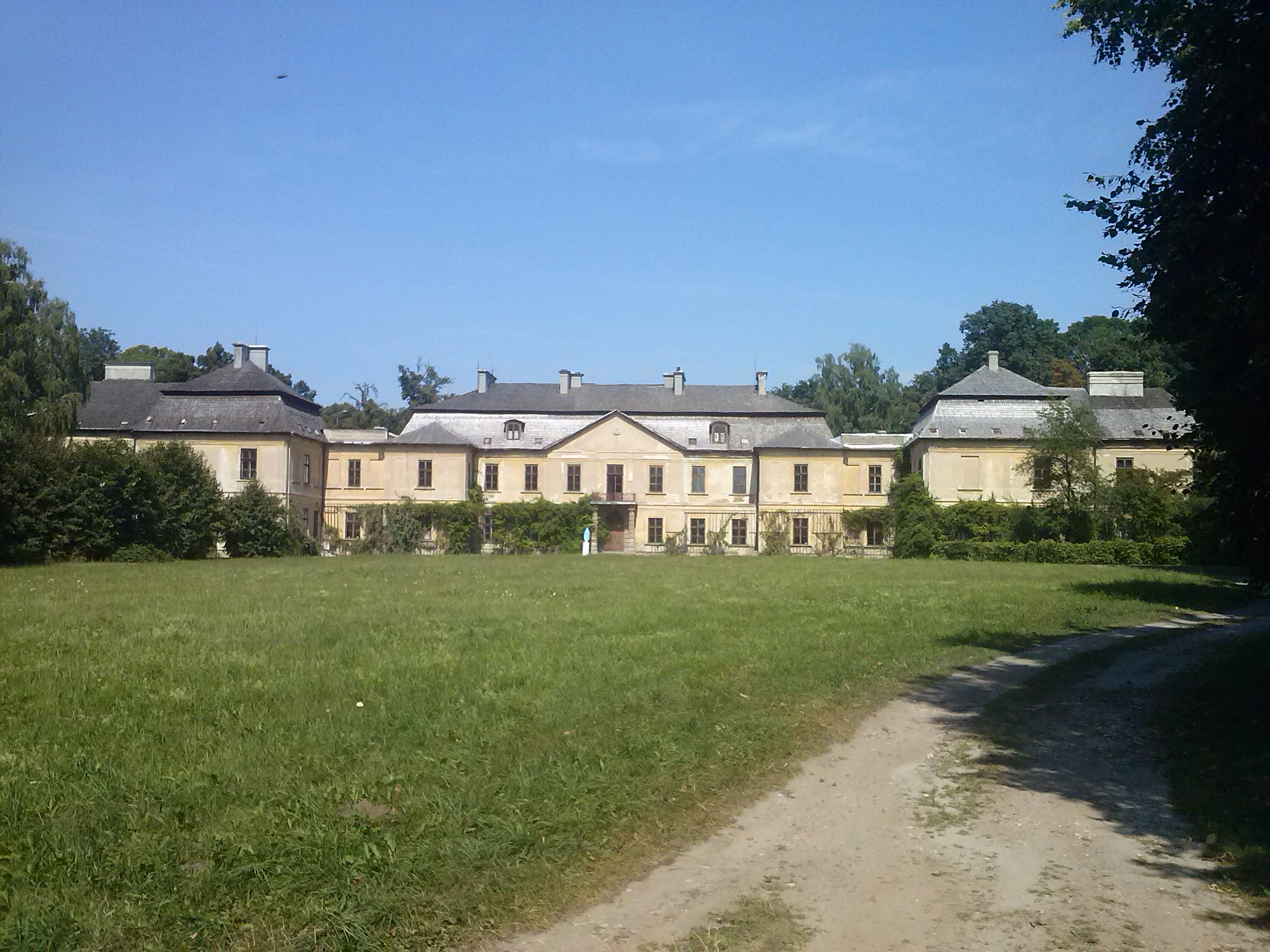 Szczebrzeszyn, pałac, XVIII, XIX